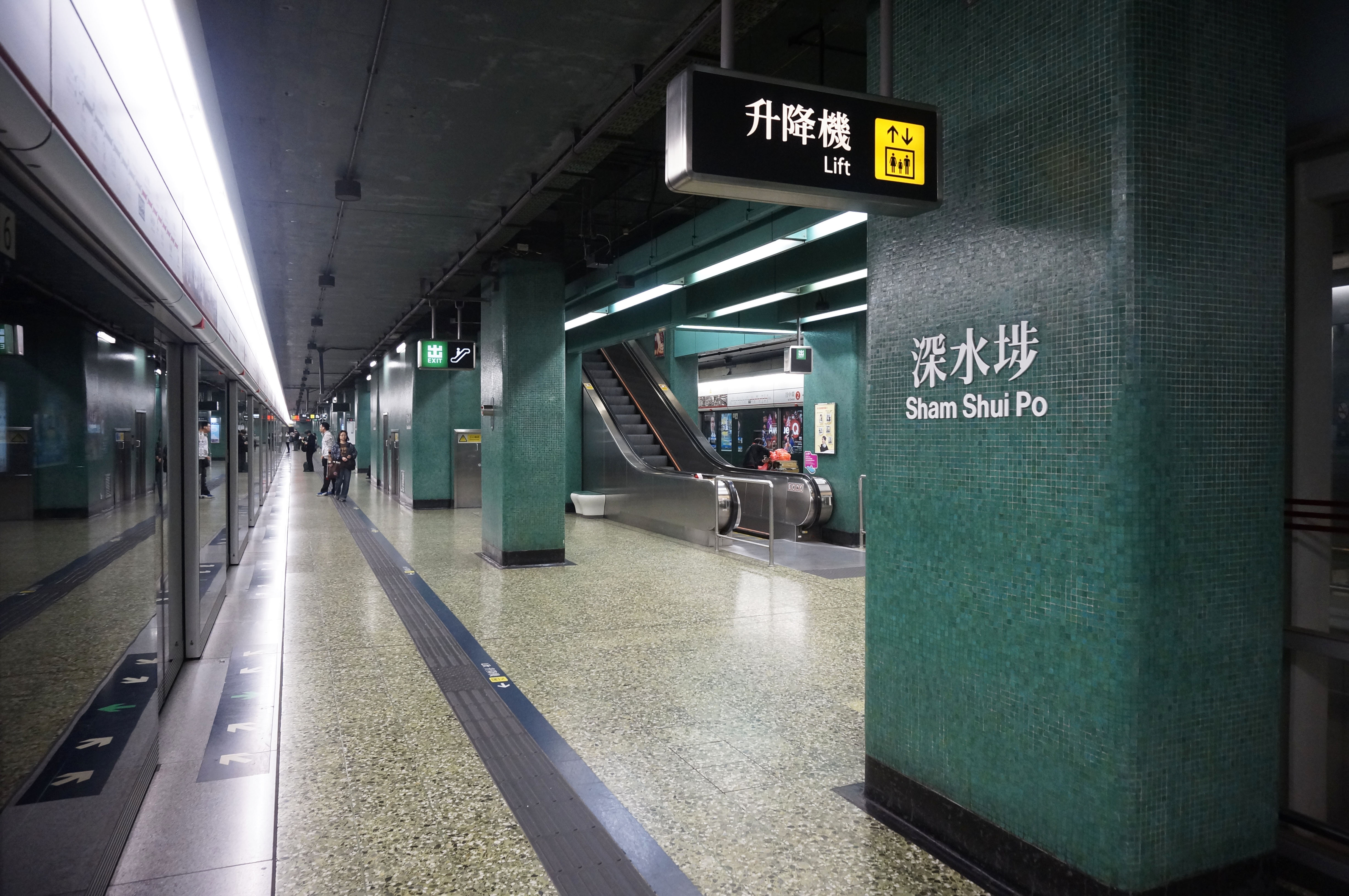 中文（香港）: 港鐵深水埗站月台